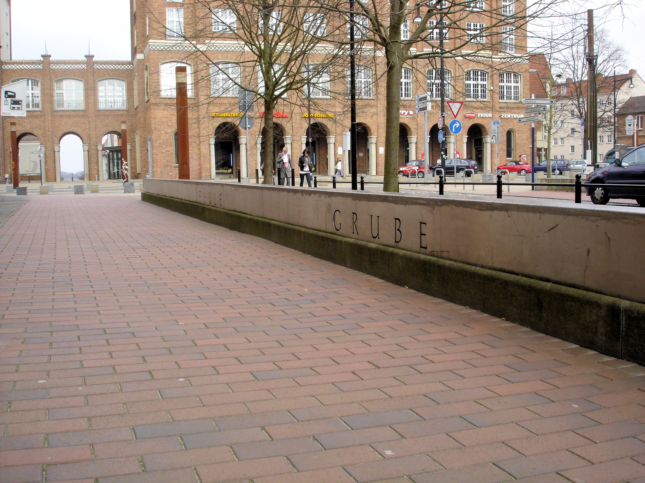 Faule Grube Rostock, "Wasserbalken" von Reinhard Buch 1999